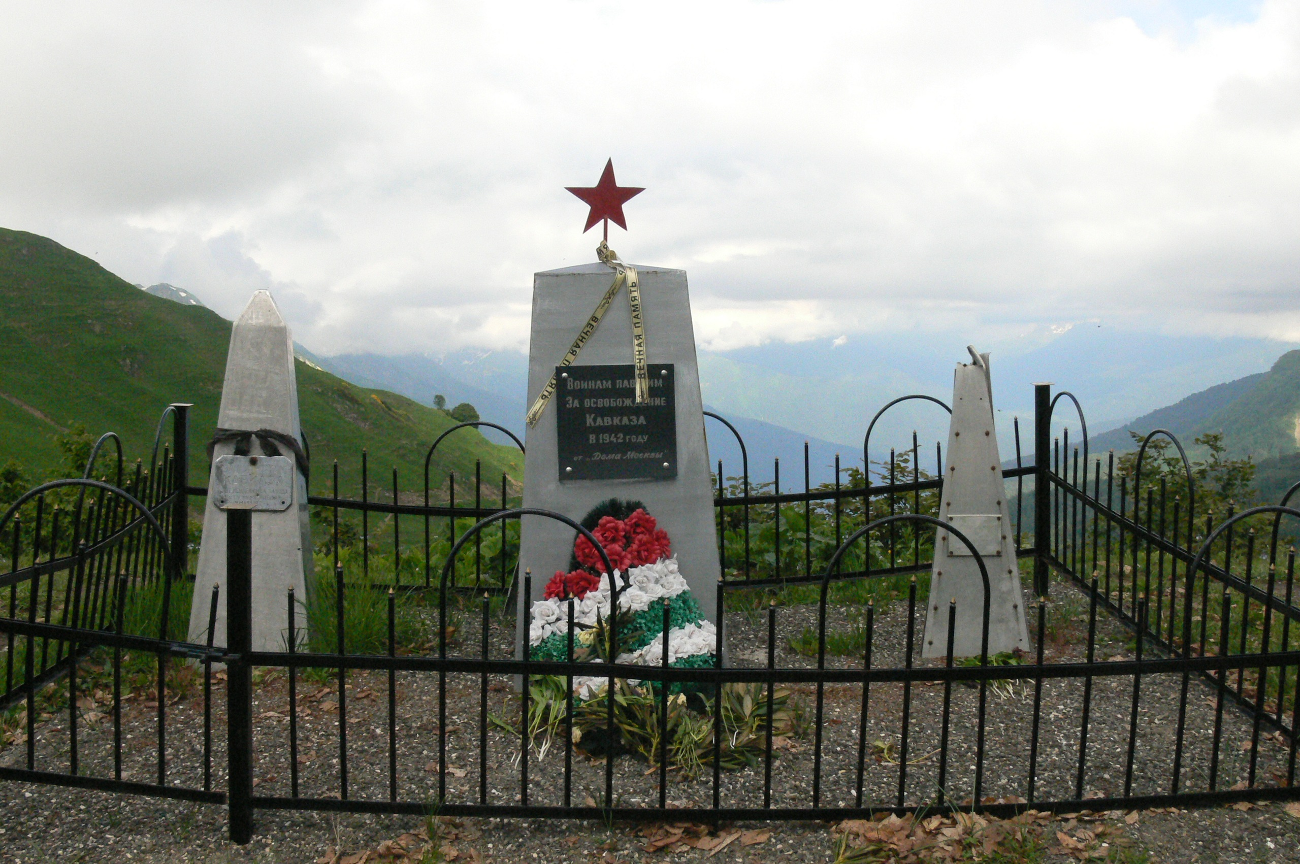 Памятник защитникам, павшим за освобождение Кавказа в Великую Отечественную войну, поставлен молодёжью города Туапсе в 1985 году. Расположен на горе Шесси (1839 метров). Здесь были остановлены и разгромлены фашистские войска.